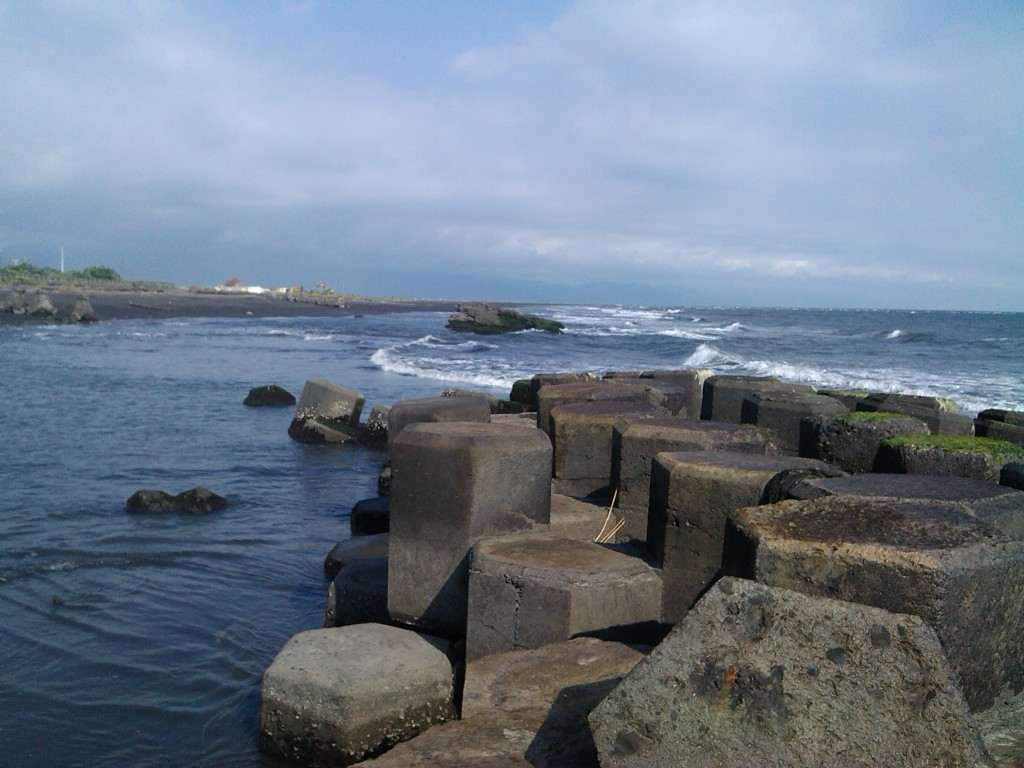 位於林邊鄉水利村之沙灘 為防止海岸侵蝕 此處設有消波塊